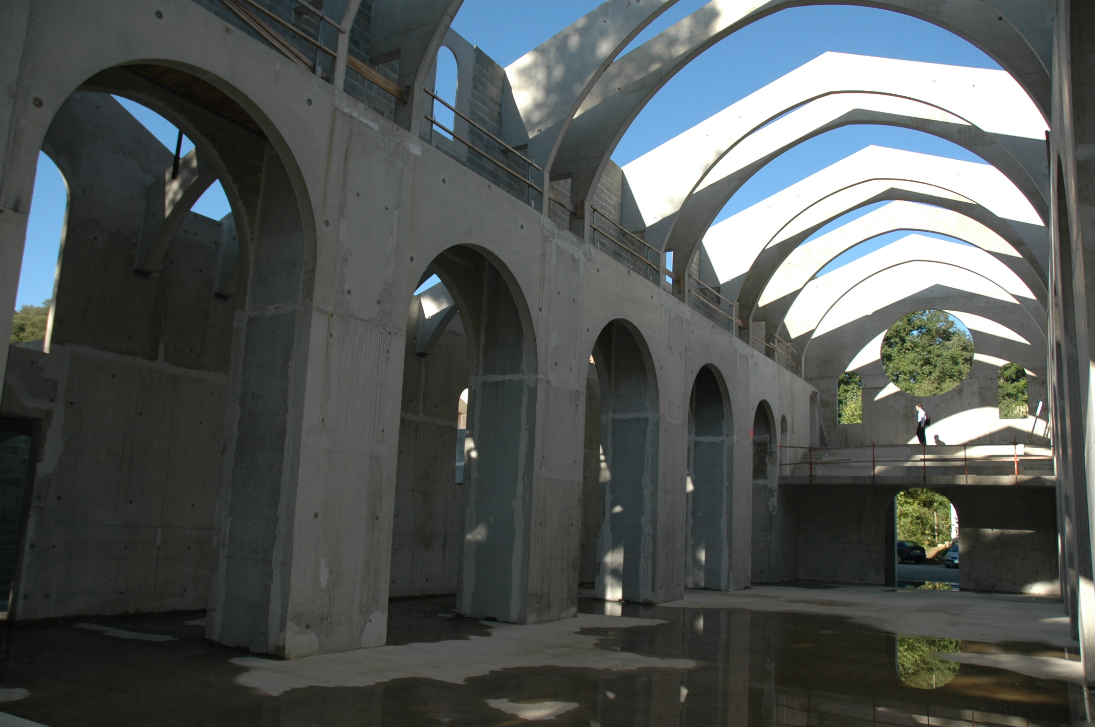 Eglise abbatiale de ND de Pesquié (09)